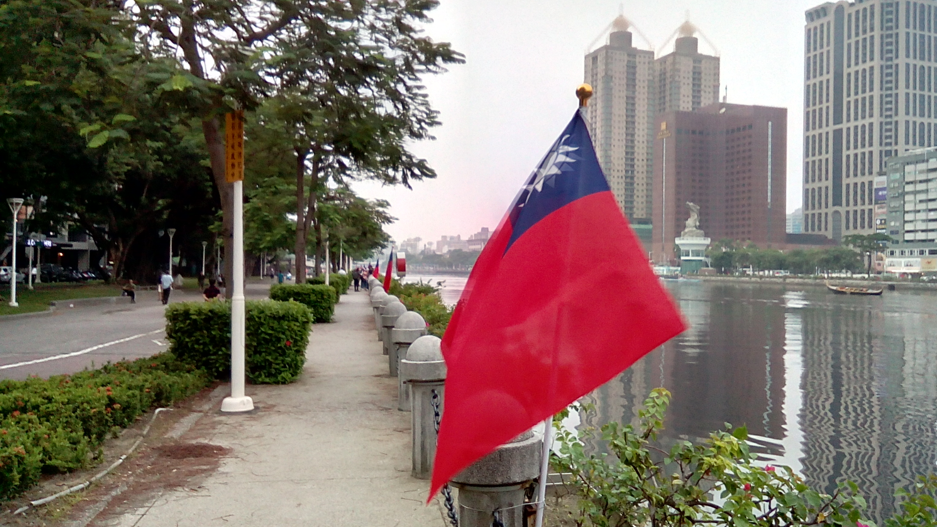 中文（台灣）: 高雄市鹽埕區高雄橋旁，愛河西畔中華民國國旗旗海，慶祝中華民國108年國慶。